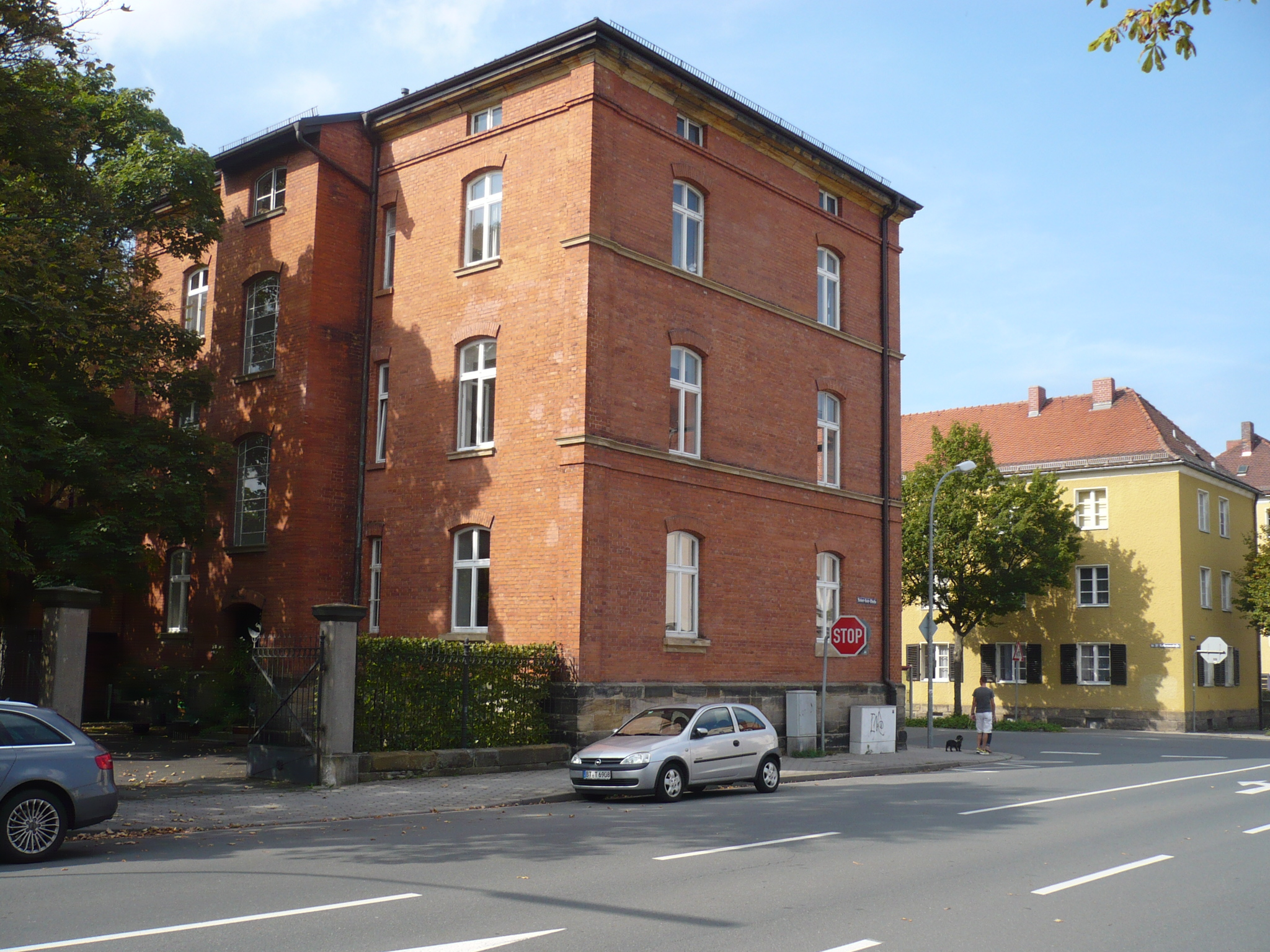 Ehemaliges Bezirkskommandogebäude Bayreuth